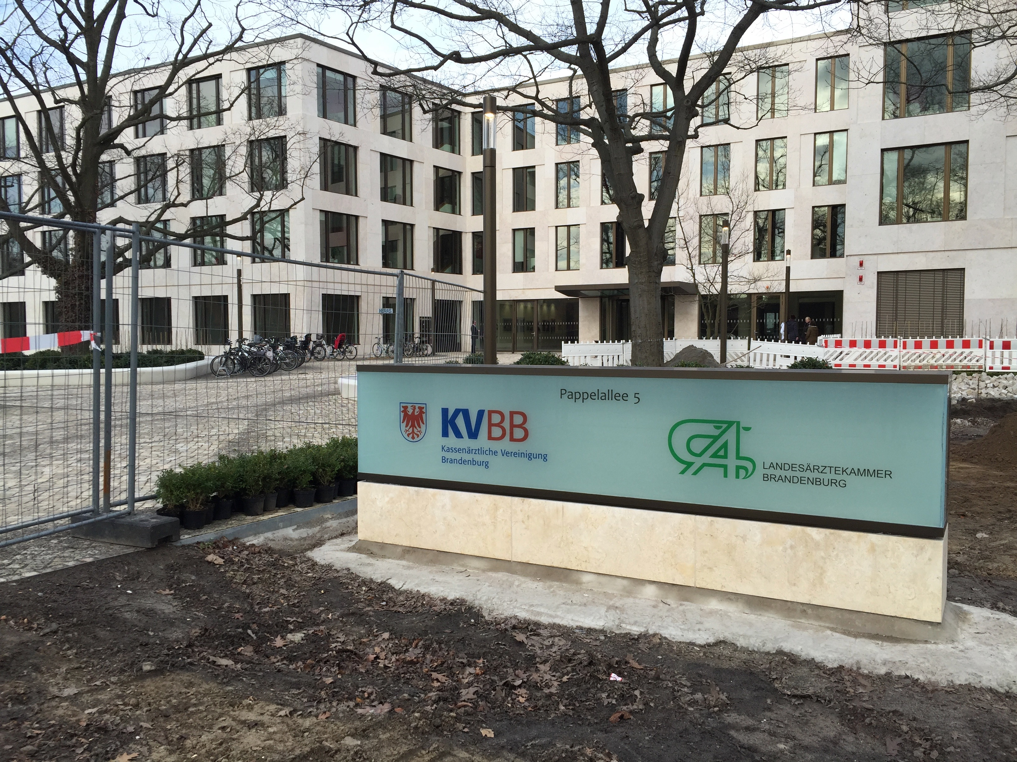 Haus der Landesärztekammer Brandenburg in Potsdam unmittelbar nach der Einweihung